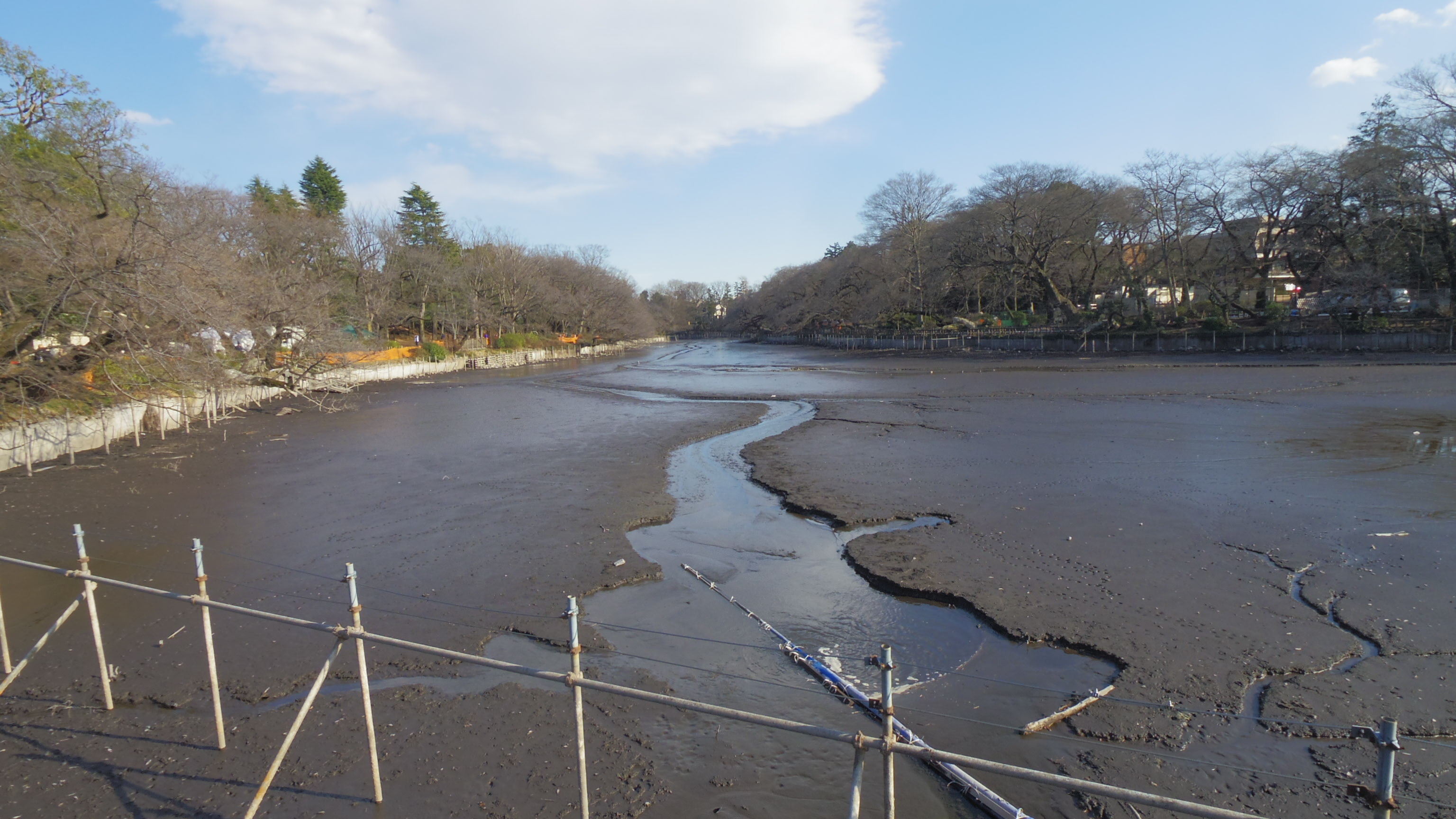 井の頭池。かいぼりにより水が抜き取られた状態。2016年2月撮影。